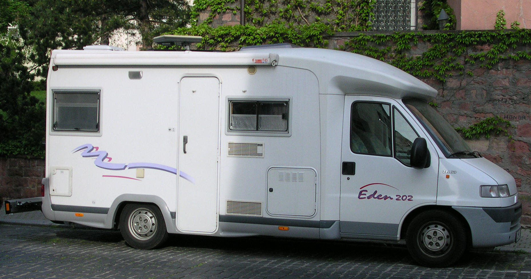 Challenger „202 - Eden“. Teilintegriertes Wohnmobil auf Fiat Ducato 2.8, Baujahr 2001, 2730 kg Leergewicht